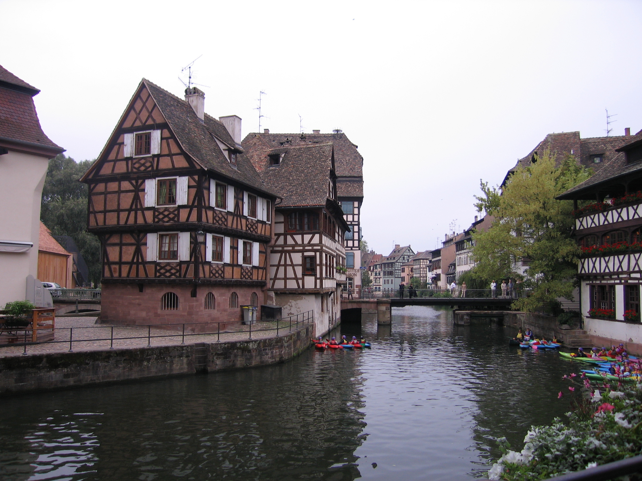 Petite France, Strasbourg, Maison de l'éclusier (XVIIIe-1950), 2 quai des moulins